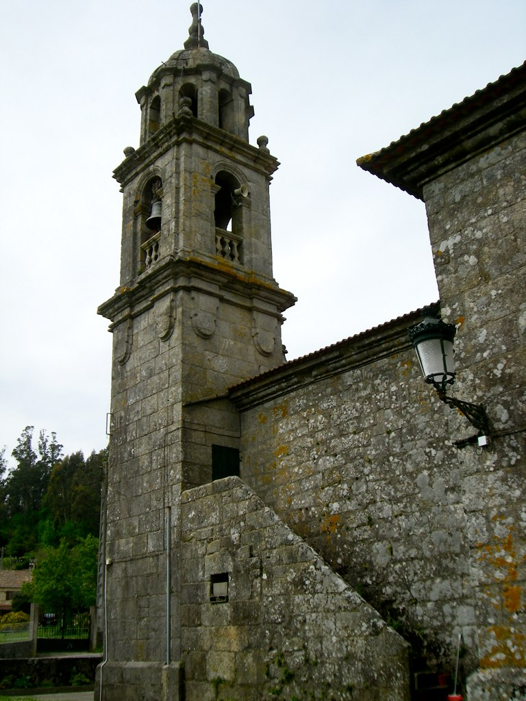 Campanario de San Mamede